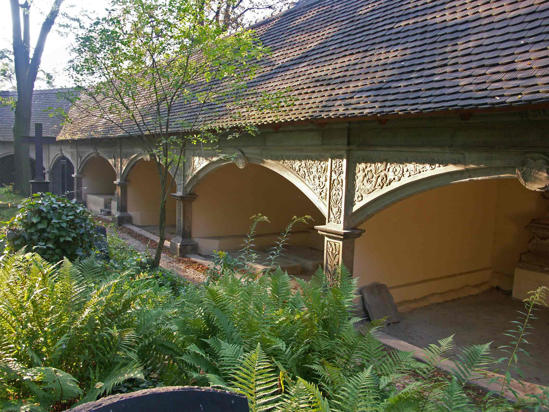 Arkaden des Stadtgottesackers in Halle